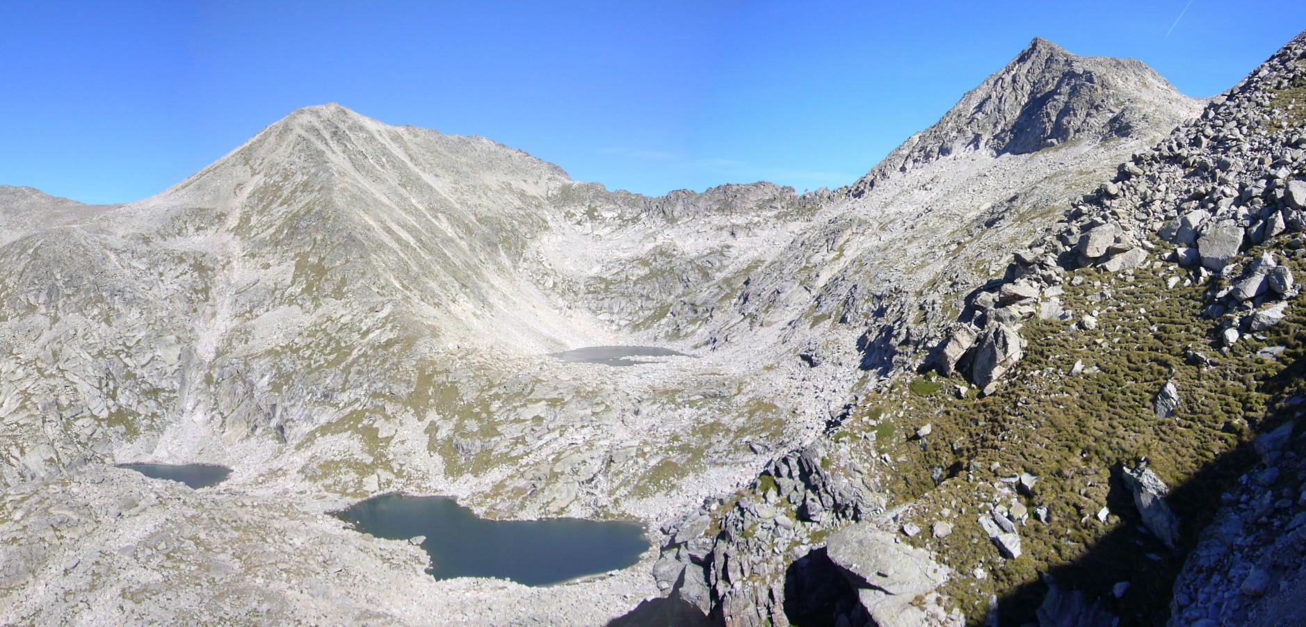 Estanys Gelats de la Coma d'Abeller vistos des de la Serra Plana, amb la Punta Senyalada a l'esquerra i el Pic d'Abellers a la dreta; la Vall de Boí, Alta Ribagorça, Catalunya